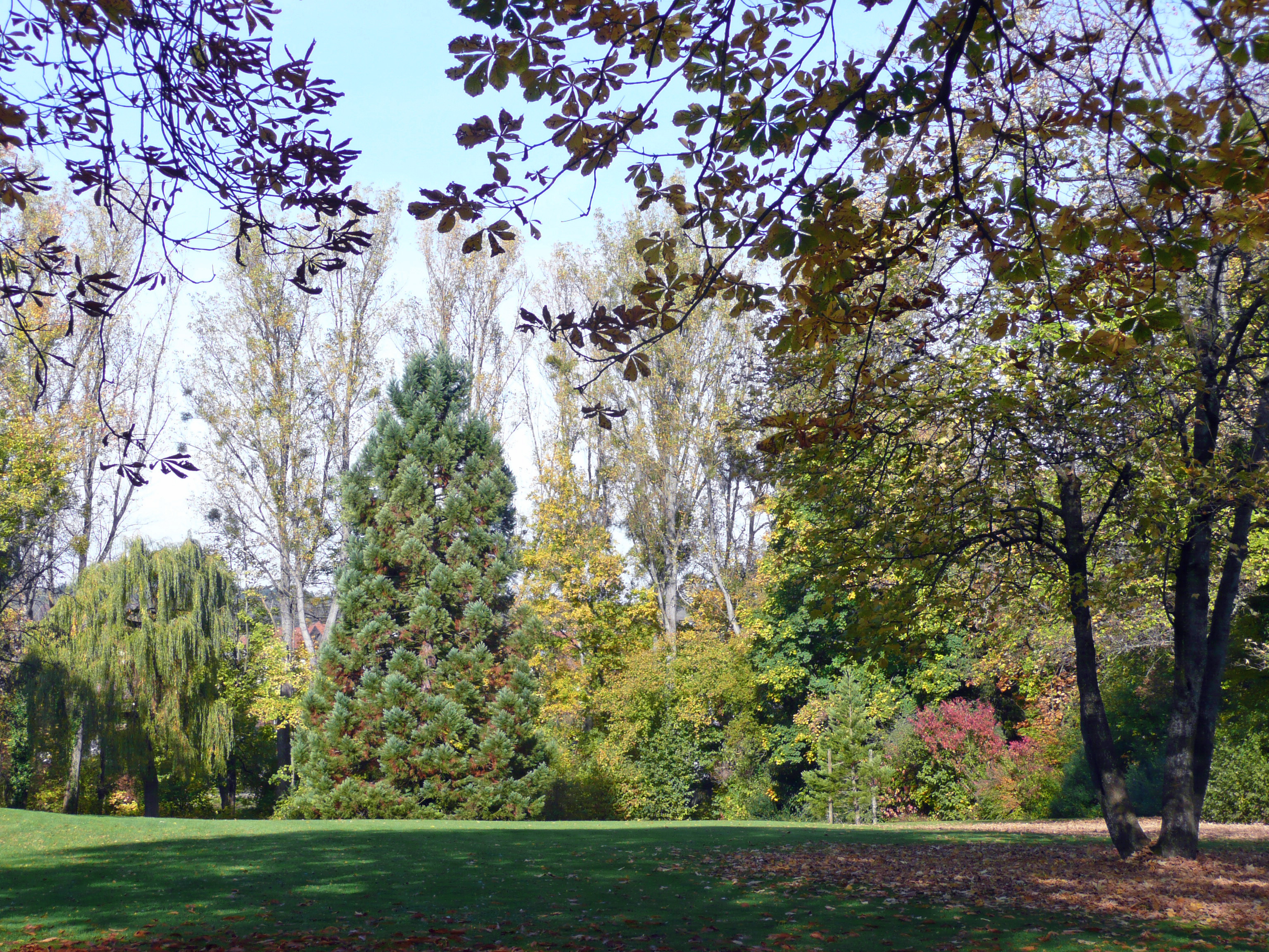 Park in Gärtringen bei der Villa Schwalbenhof - Erich Kiefer (1945-1982: Fabrik für lufttechnische Anlagen) baut 1954 die Villa Schwalbenhof inklusive Park